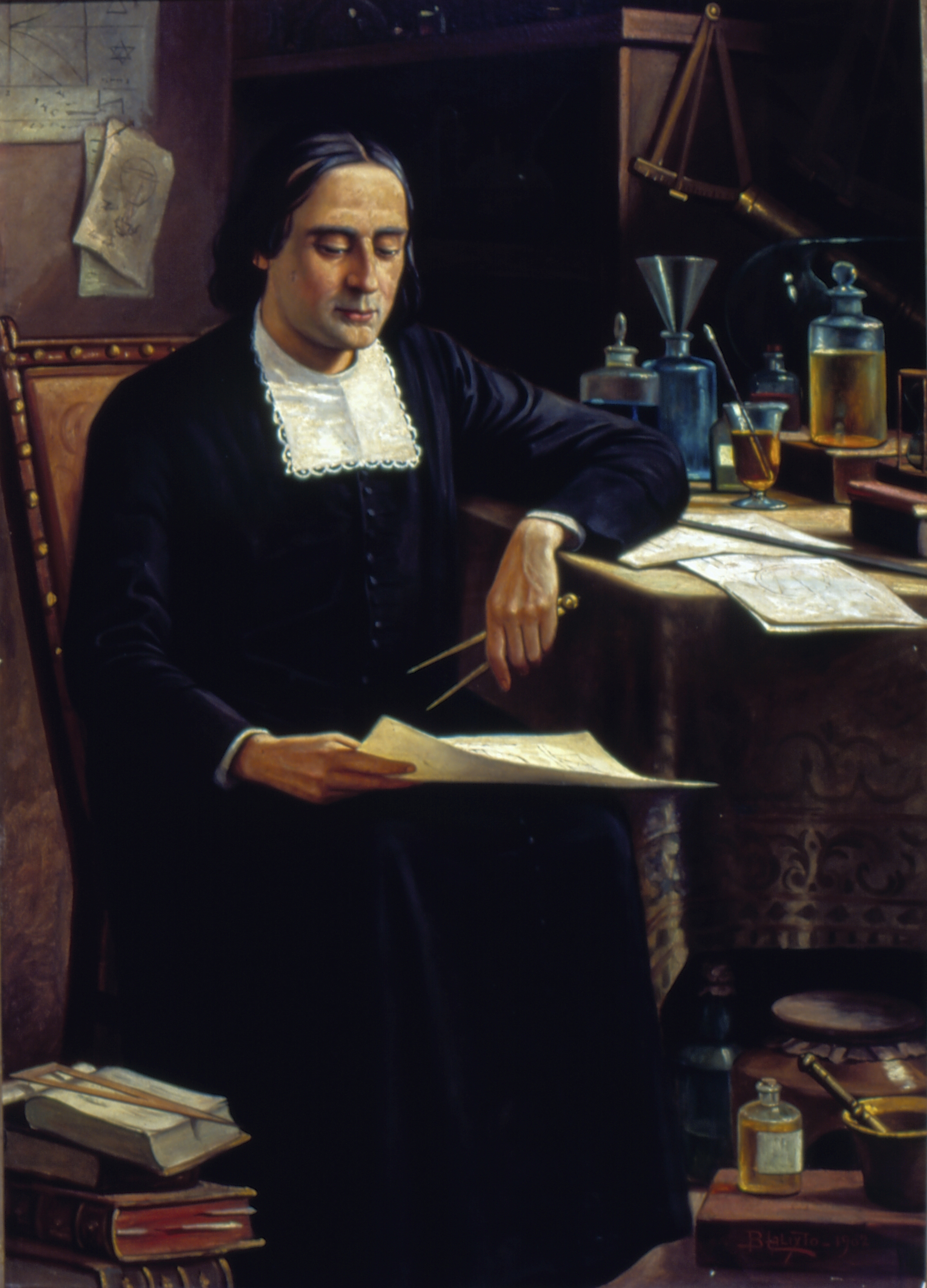 Obra que integra o acervo do Museu Paulista da USP. Coleção Benedito Calixto de Jesus - CBCJ